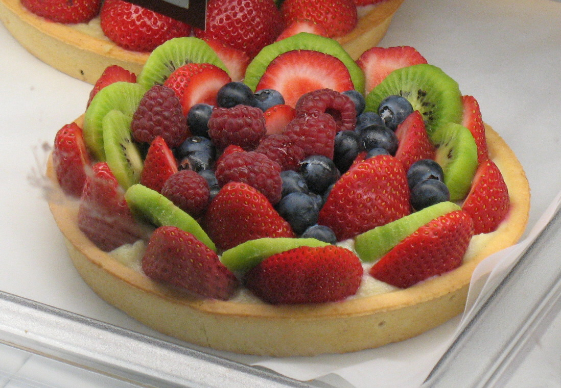 Fruit tart